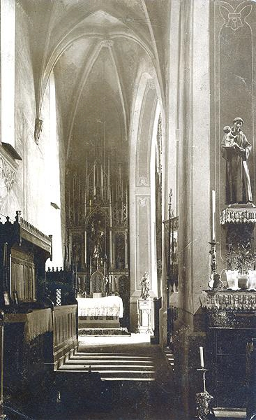 pravá loď s bočným oltárom 1956